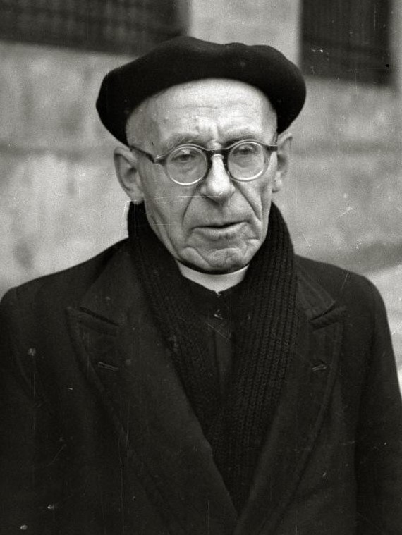 Título original: Jose Miguel de Barandiaran (1/1) Localización: Guipúzcoa